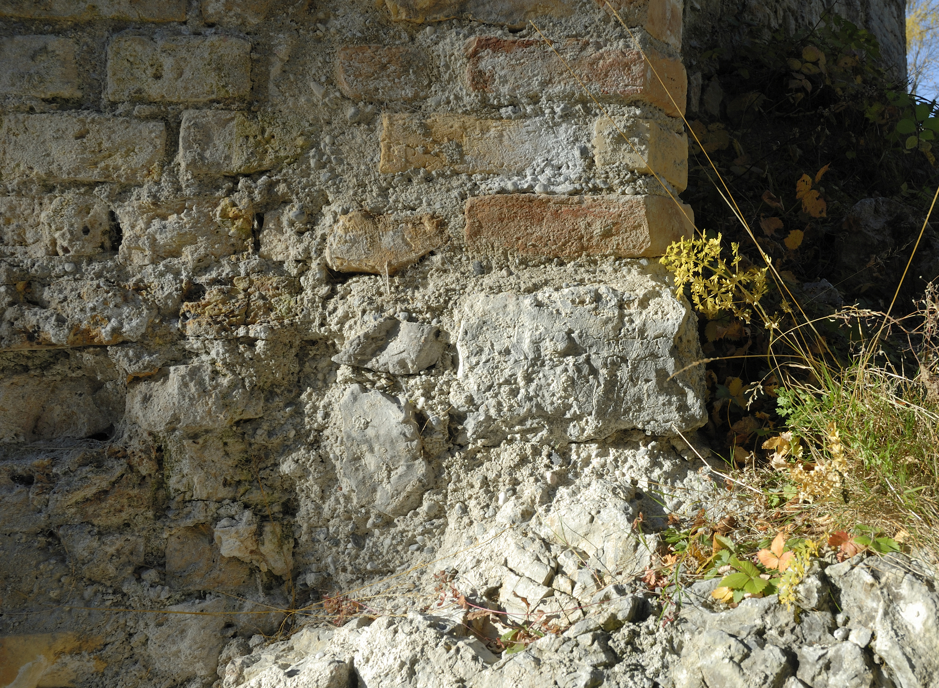 Burgruine in Thaur, Detail des Mauerwerks am nördlichen Torbogen, westlicher Fuß